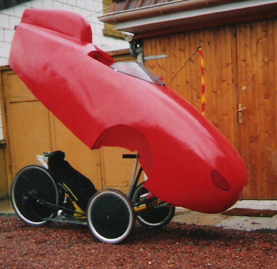 velomobile.fr modele rouge capot soulevé